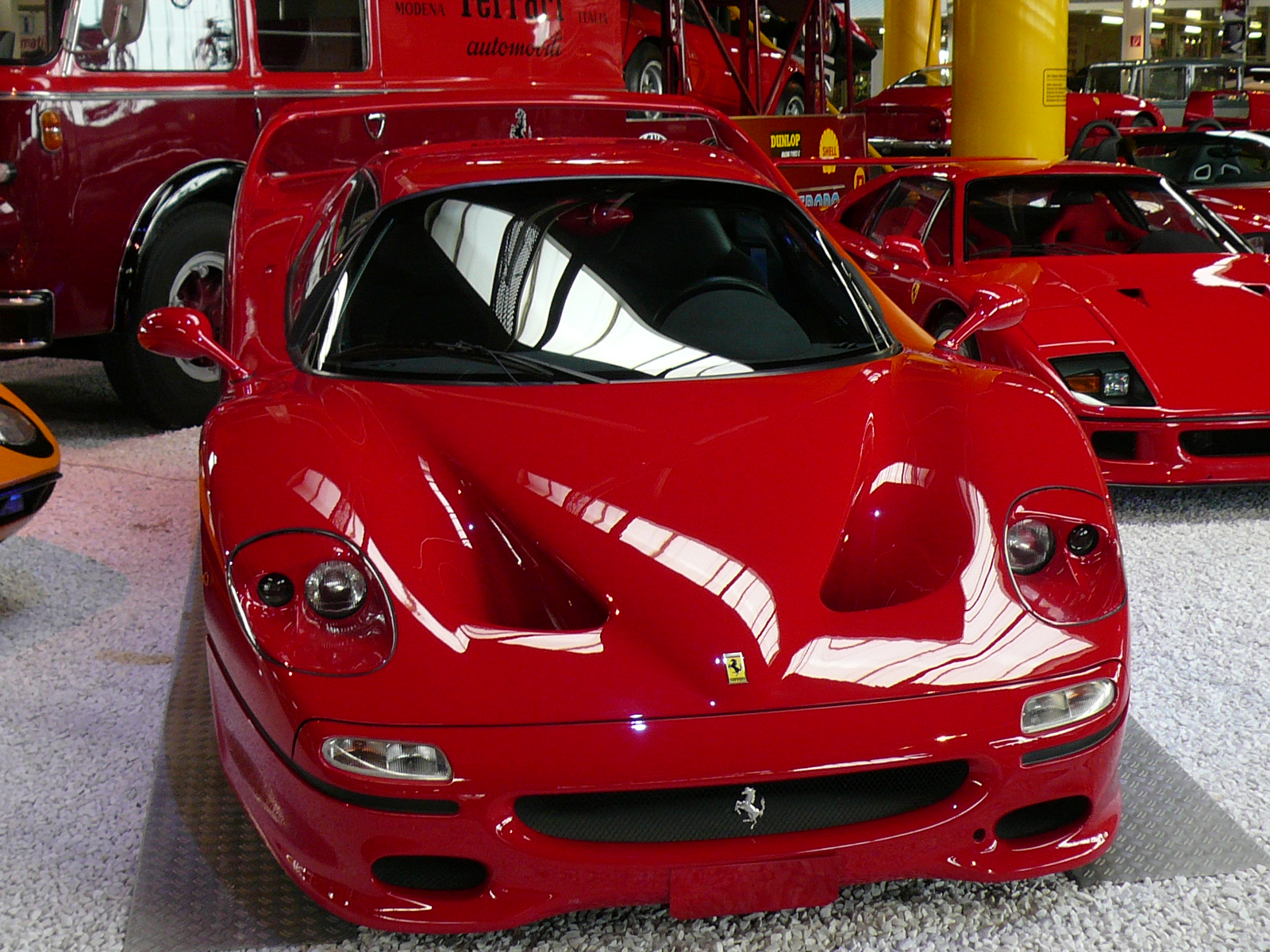 Ferrari F50 Frontansicht